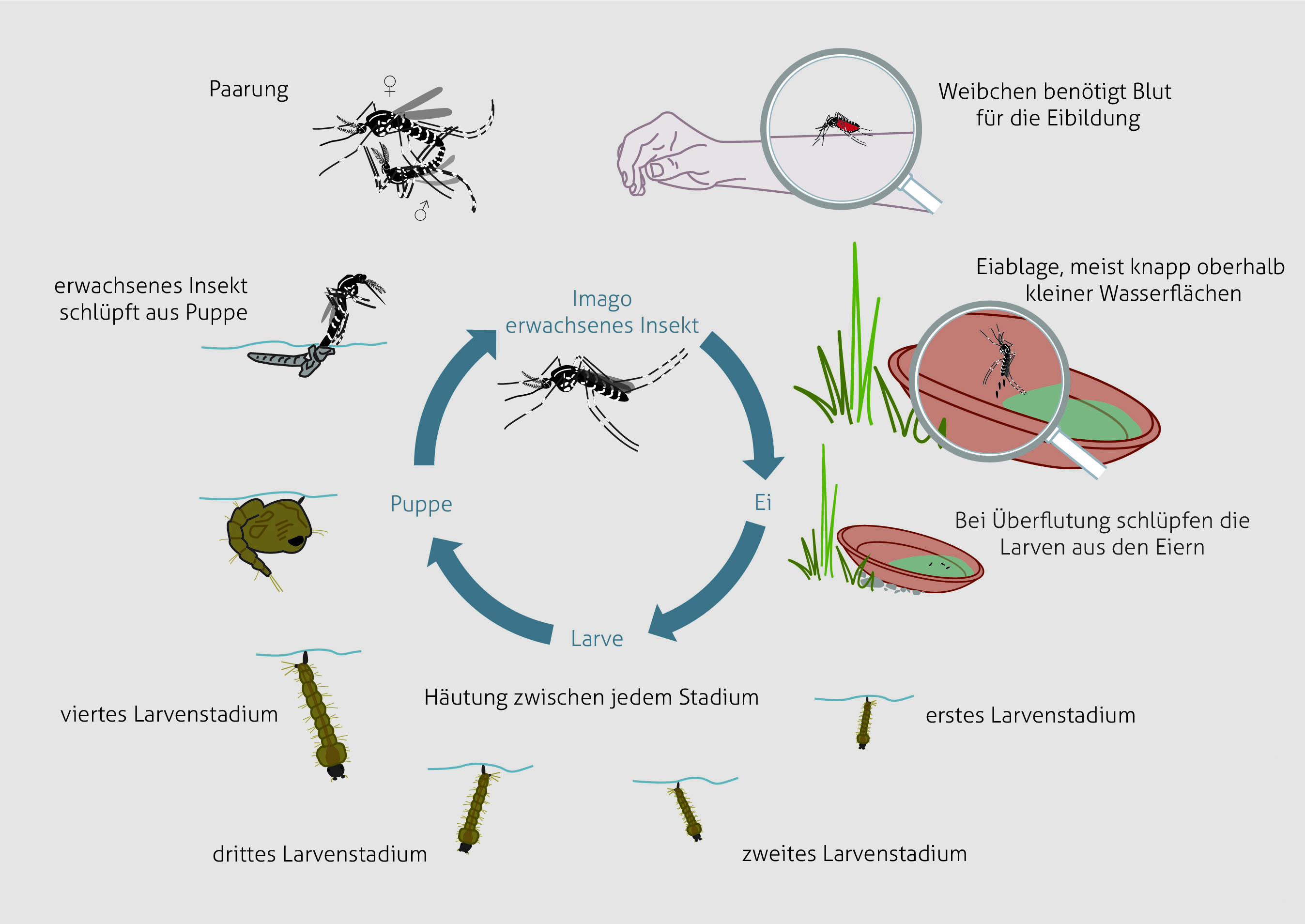 Lebenszyklus der Asiatischen Tigermücke Aedes albopictus syn. Stegomyia albopicta. Von Ingeborg Schleip, Biogents AG.